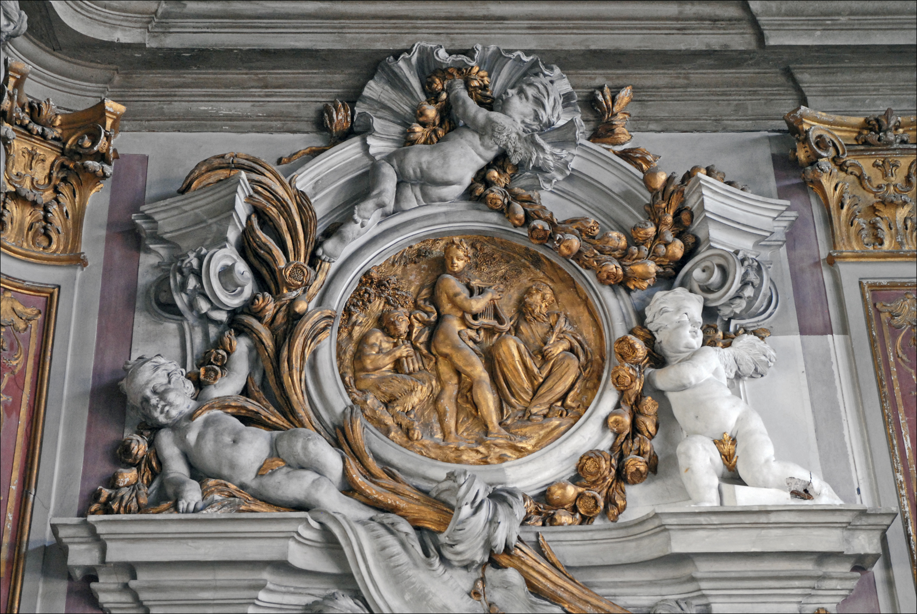 Décor d'une porte de la salle de bal C'est l'architecte du palais Antonio Gaspari qui en est l'auteur Le palais Zenobio a été érigé à la fin du XVIIème siècle sur un projet d'Antonio Gaspari, un élève de Longhena. Au XIXème siècle, le palais est devenu la propriété de la congrégation arménienne, fondée par Méchitar et dont le couvent est installé depuis 1717 sur l'île San Lazzaro, pour y ouvrir un collège (Moorat-Raphael) en 1836. Ce collège a transmis la culture et la langue arménienne à de nombreux jeunes pendant plus de 160 ans. Il a été fermé en 1997. Un projet de rénovation est en cours en vue de créer un centre culturel et un espace de séminaire. voir le panoramique de la salle de bal du palais